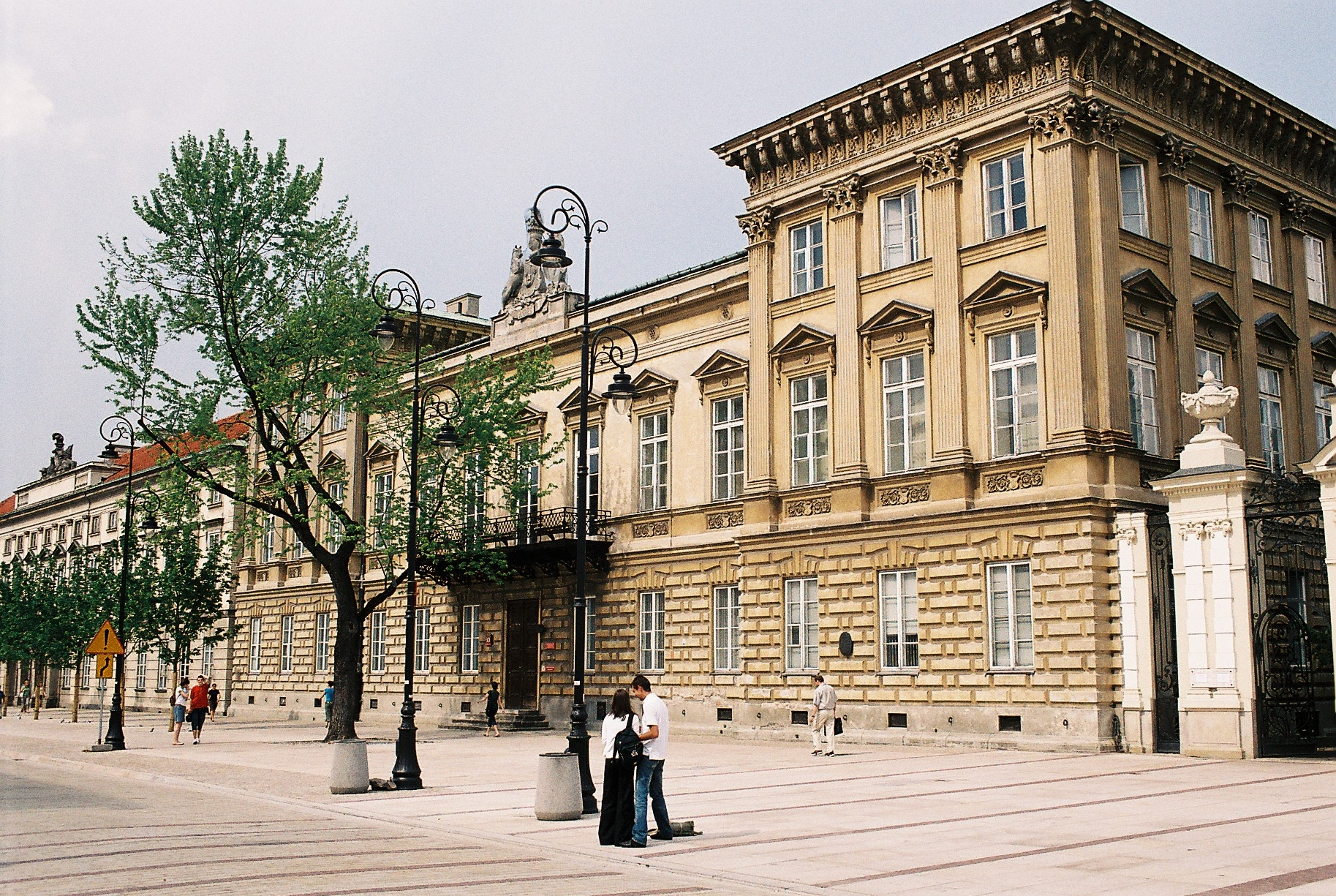 Pałac Uruskich-Czetwertyńskich - siedzib Wydziału Geografii i Studiów Regionalnych Uniwersytetu Warszawskiego